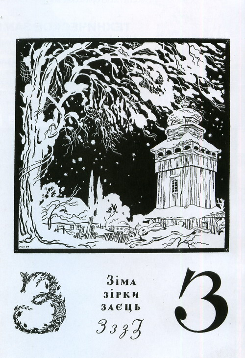 Українська абетка, літера З, Київ, 1919